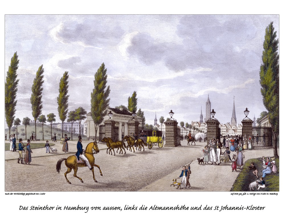 Steintor von außen, links die Altmannhöhe und St. Johannis-Kloster